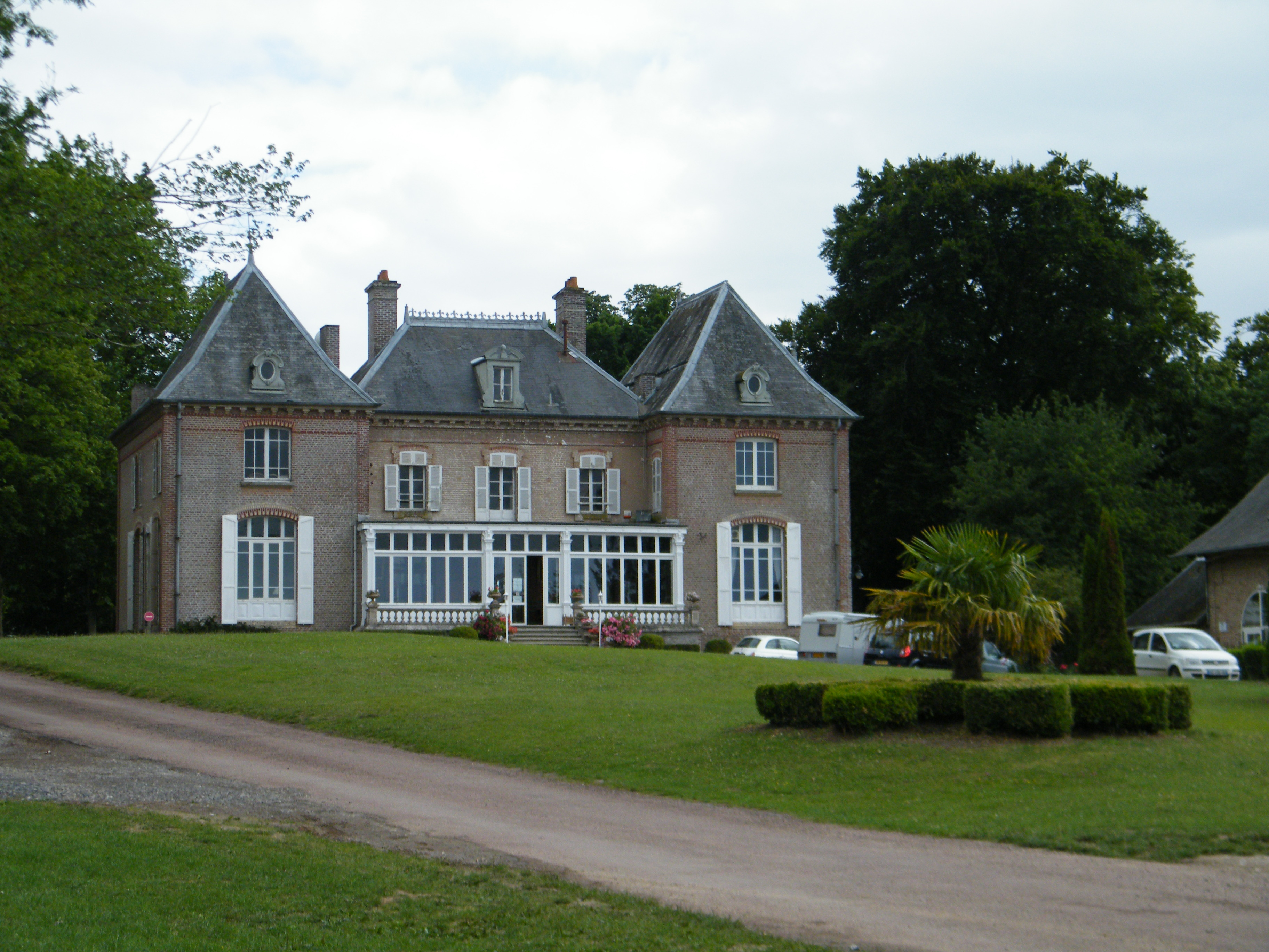 Château de Drancourt, Estréboeuf, Somme, France